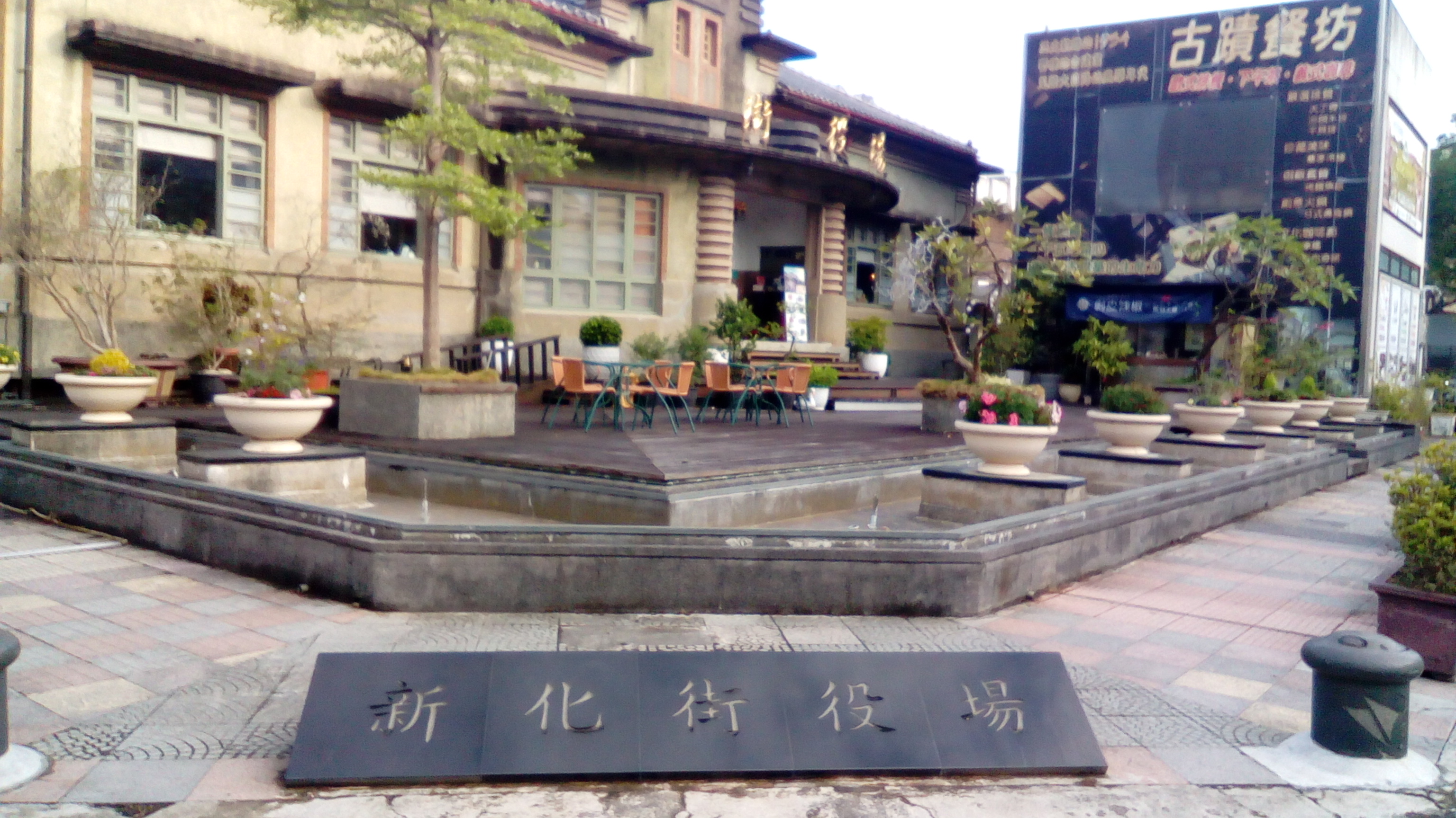 位於新化區中正路及忠孝路口 楊逵紀念館北側 內部已整裝改建成咖啡廳